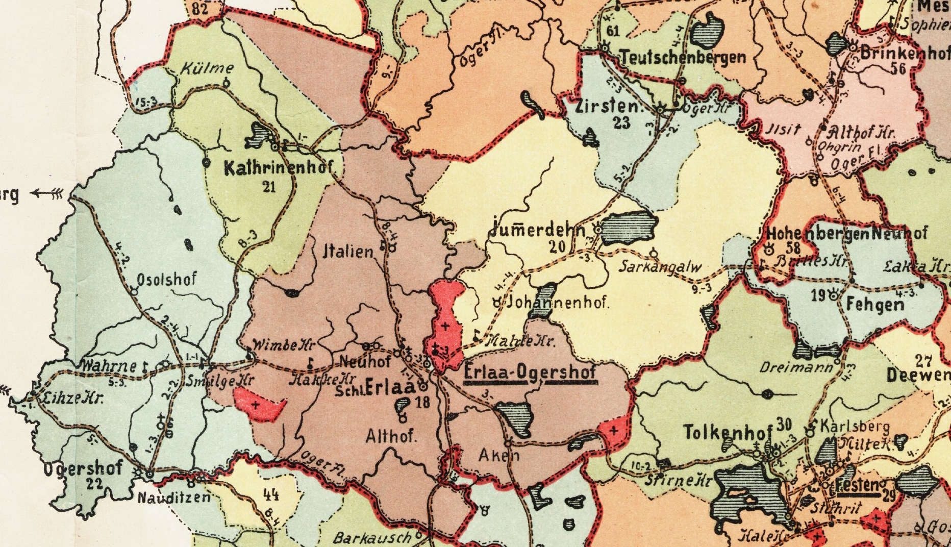 Ērgļi-Ogre kihelkonna mõisad 1903. aasta kaardil.